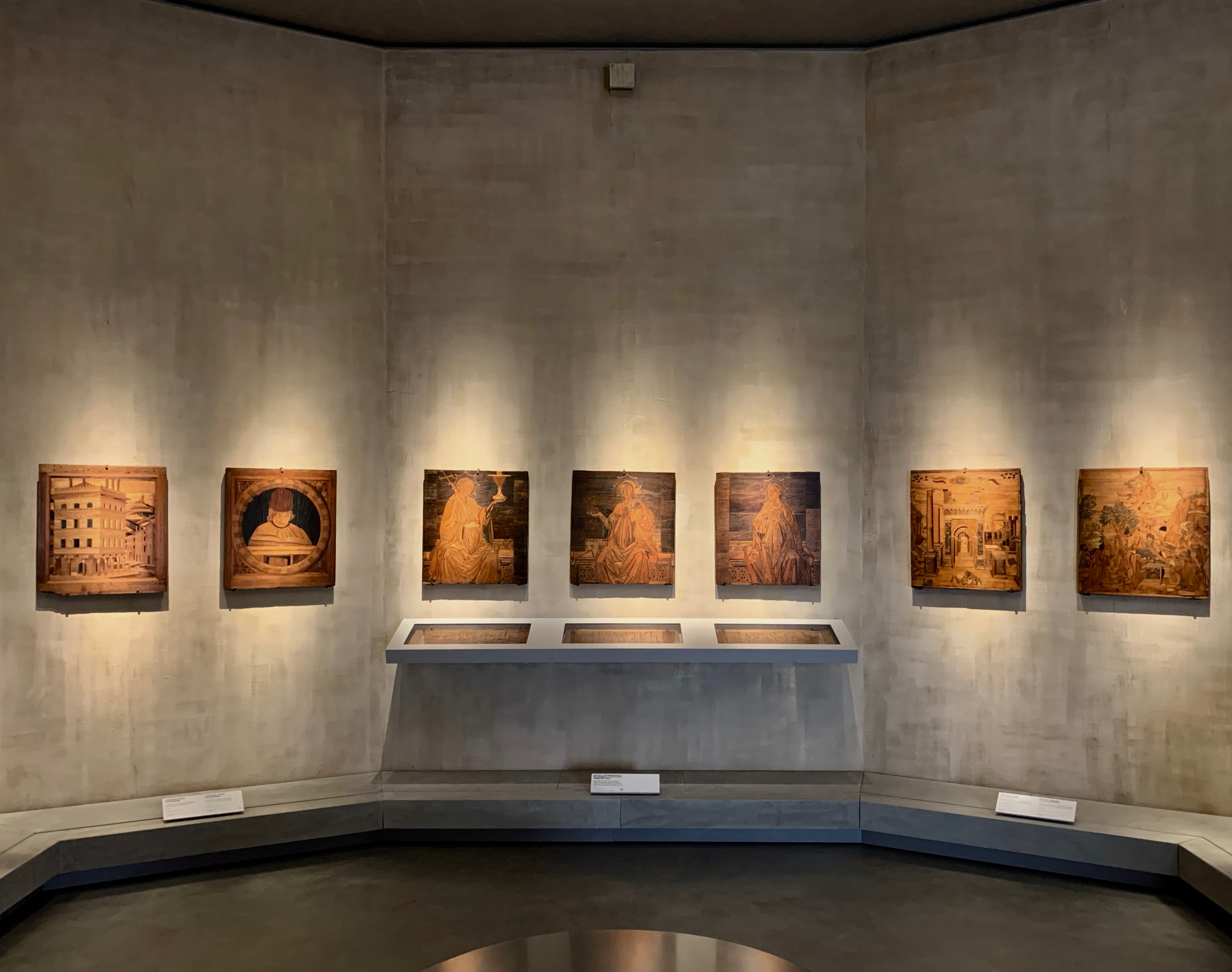 Tarsie lignee al museo dell'Opera del Duomo di Pisa provenienti dalla Cattedrale. A sinistra: Formella con prospettiva urbana e formella con Diacono che legge, 1485-86 di Critoforo Canzoni da Leonida. Al centro: 3 Formelle con le Virtù teologali (nella teca i sedili), 1474-75 di Baccio e Pietro Pontelli su cartone di Sandro Botticelli. A destra: Formella con rovine e animali in lotta, prima metà del XVI sec. di Giovan Battista del Cervelliera e formella con Assunzione della Vergine, XVI sec. di una bottega toscana.